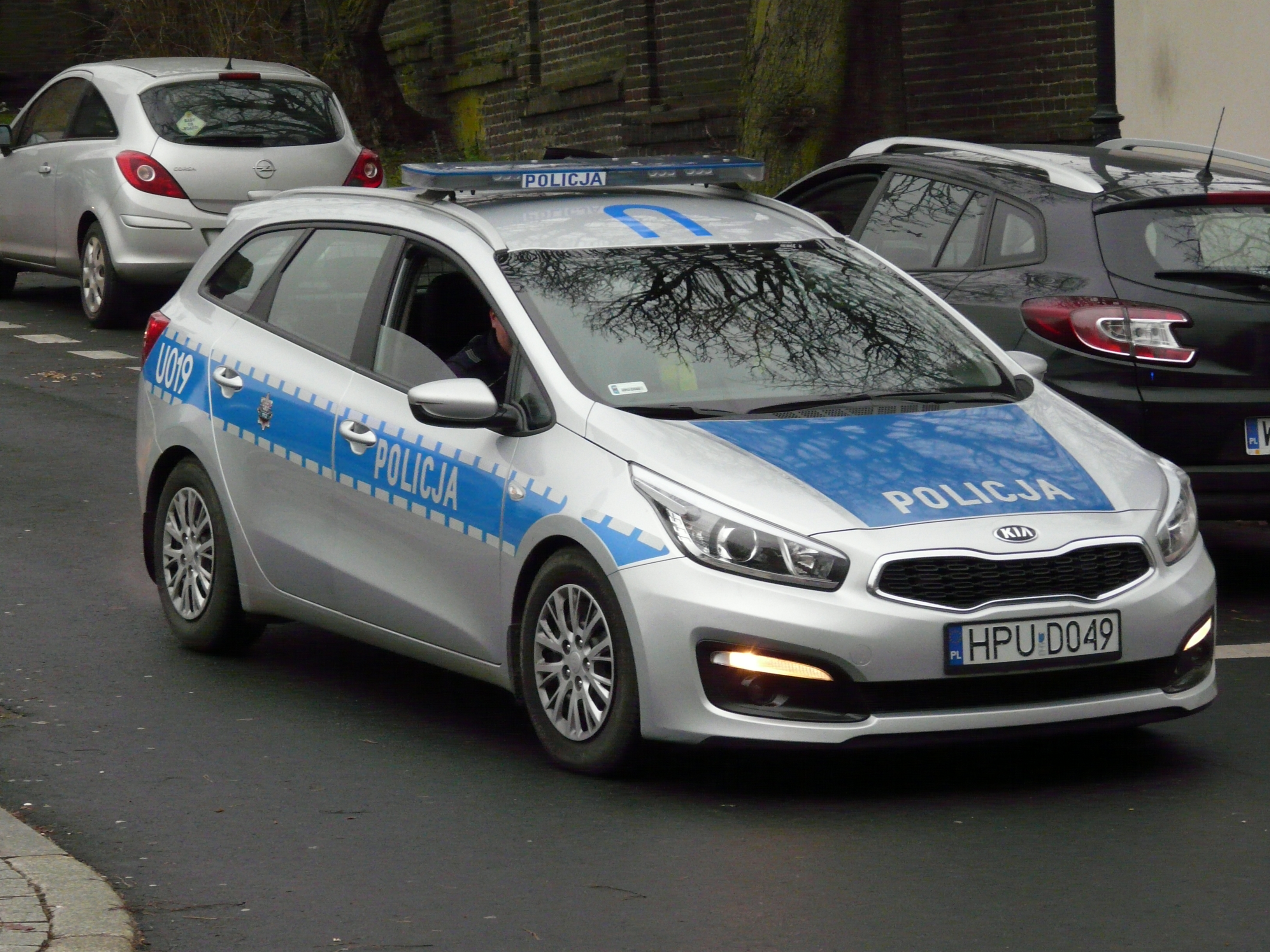 Radiowóz Kia Cee'd przy kościele św. Wojciecha w Poznaniu